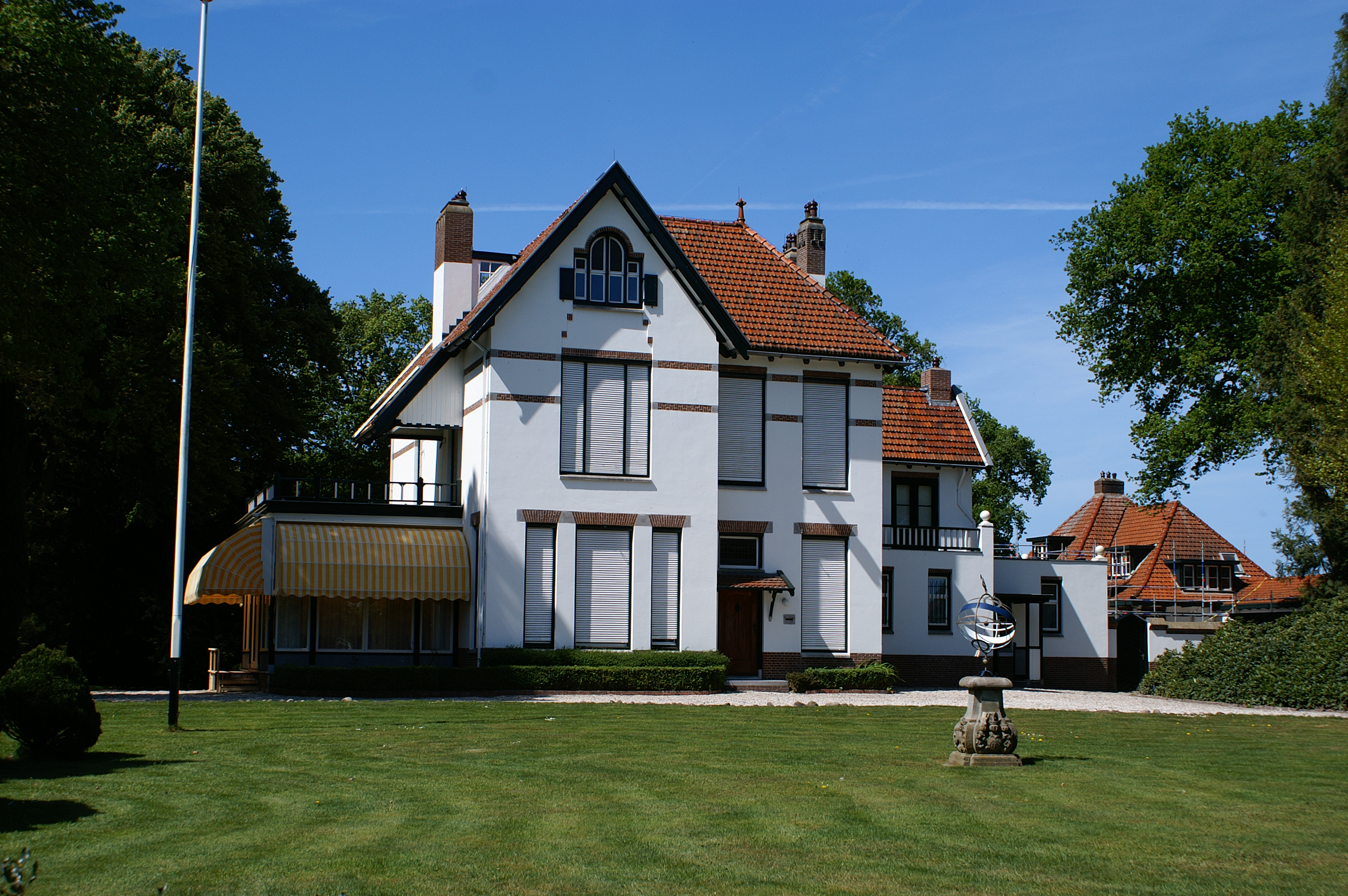 Donia-State te Sint Nicolaasga.